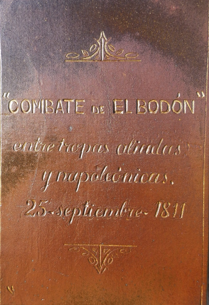 Placa del monolito de El Bodón